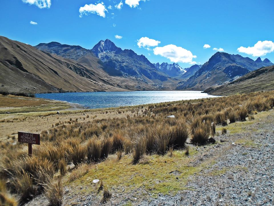 Laguna Querococha en Catac